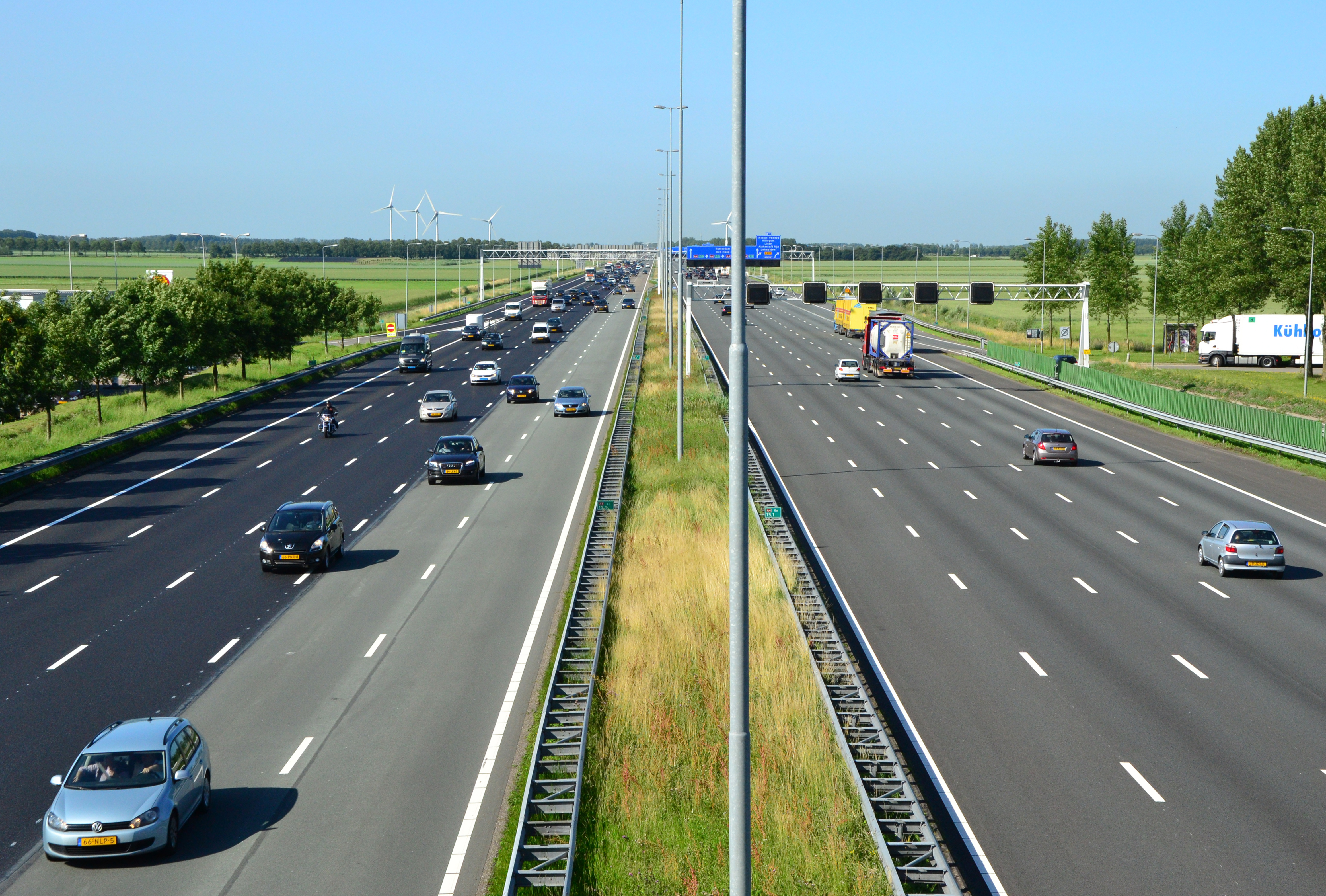 Blick auf den zehnspurigen Rijksweg 4 bei Hoofddorp .